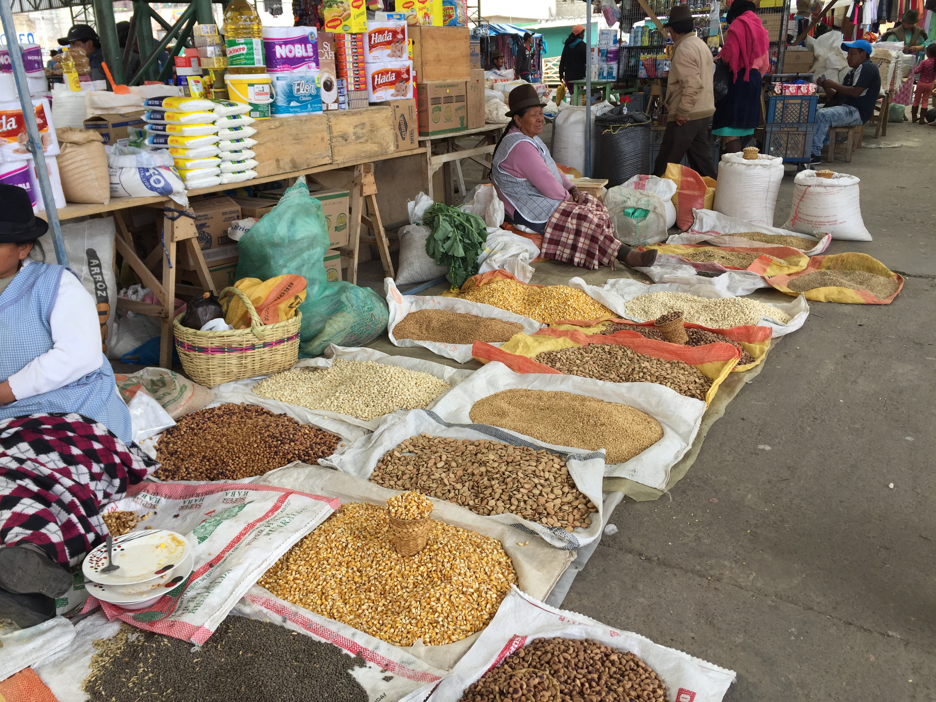 Ausgebreitete Saaten- und Körnerfrüchte. Indigener Markt in Saquisilí, Ecuador.